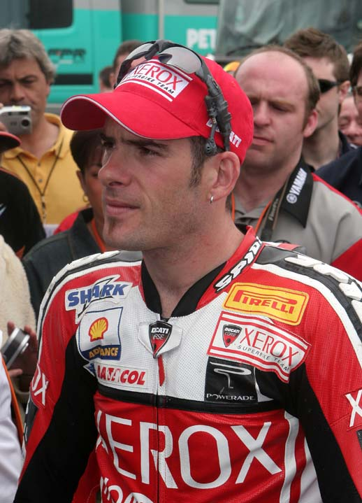 il pilota motociclistico Regis Laconi